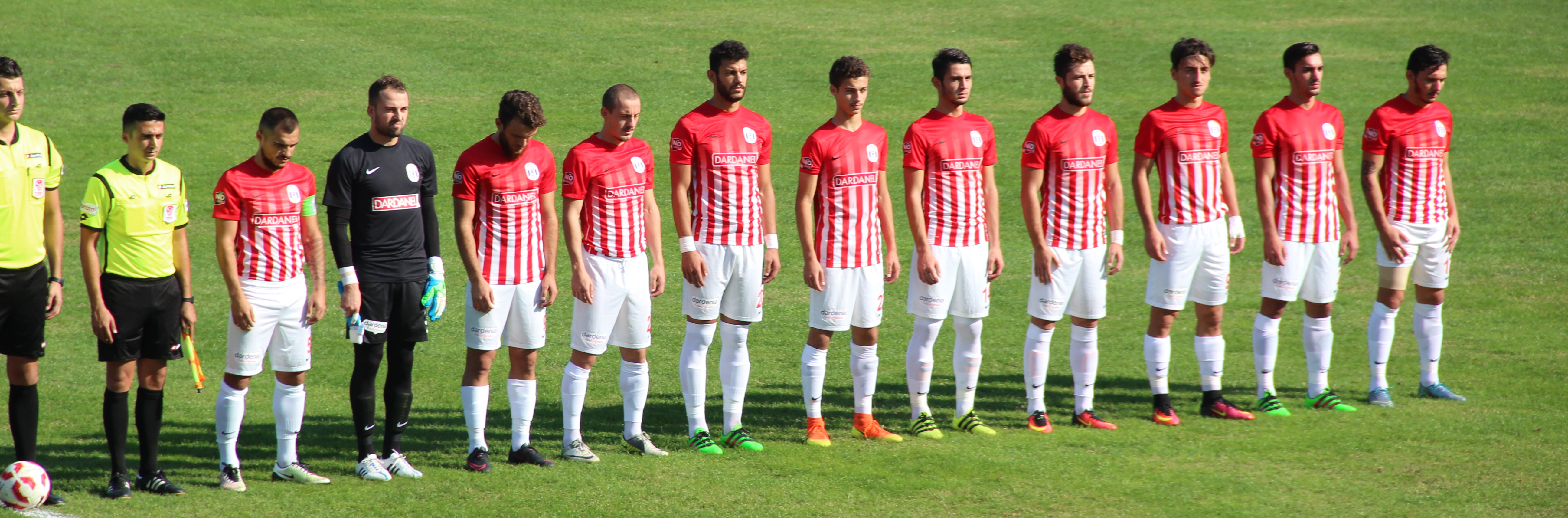 Dardanelspor 90 - Ceyhun Demircan, 2 - Sinan Akgöl, 17 - Bedri Evren, 20 - Ahmet Sönmez, 23 - Ahmed Emir Tekçam, 5 - Can Morgül, 7 - Batuhan Irmak, 21 - Ömer Sümer, 98 - Mertcan Dursun, 9 - Uğur Uğur, 14 - Ufukcan Engin